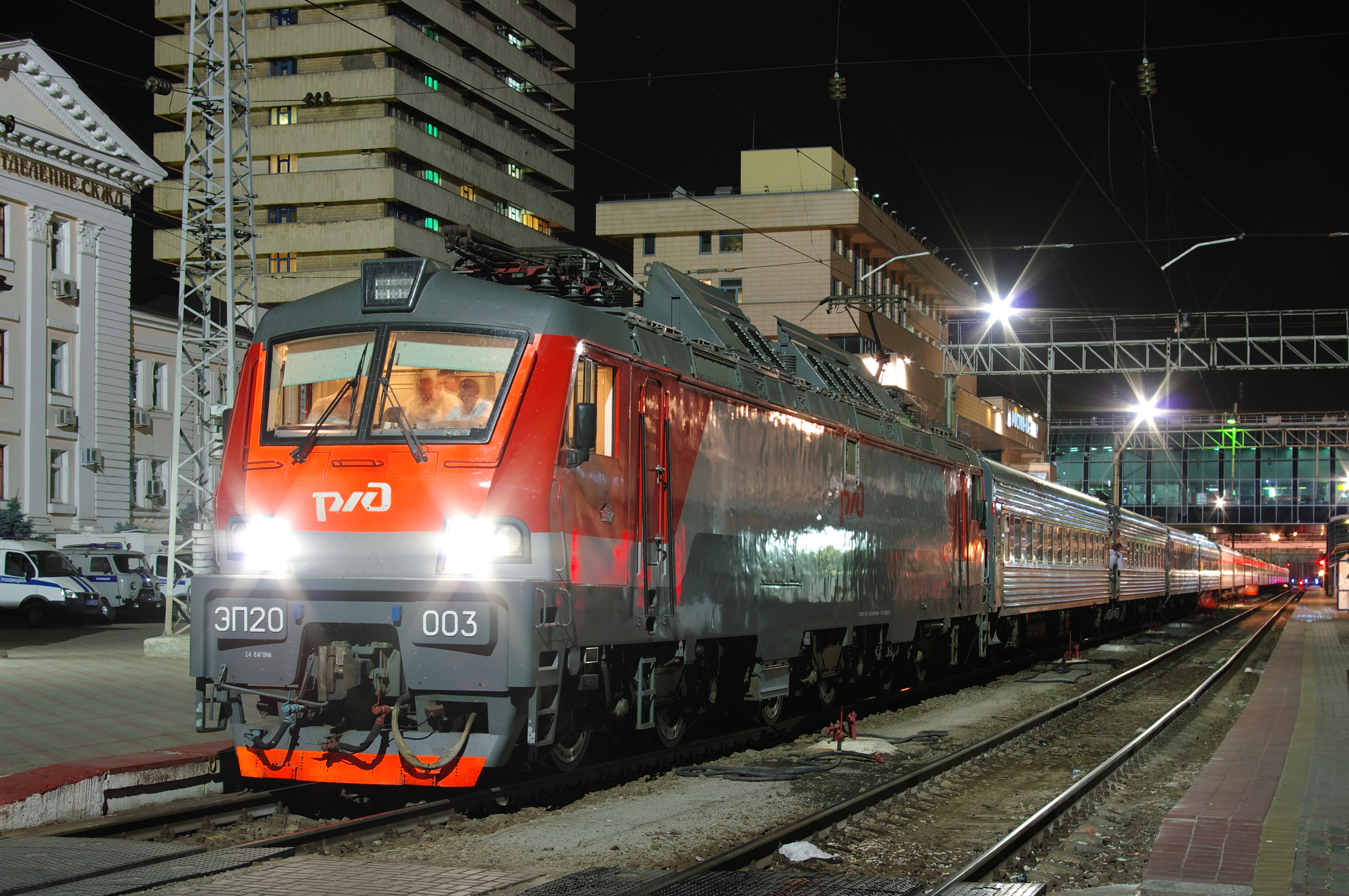 Электровоз ЭП20-003 с поездом 104С Адлер - Москва на станции Ростов-Главный